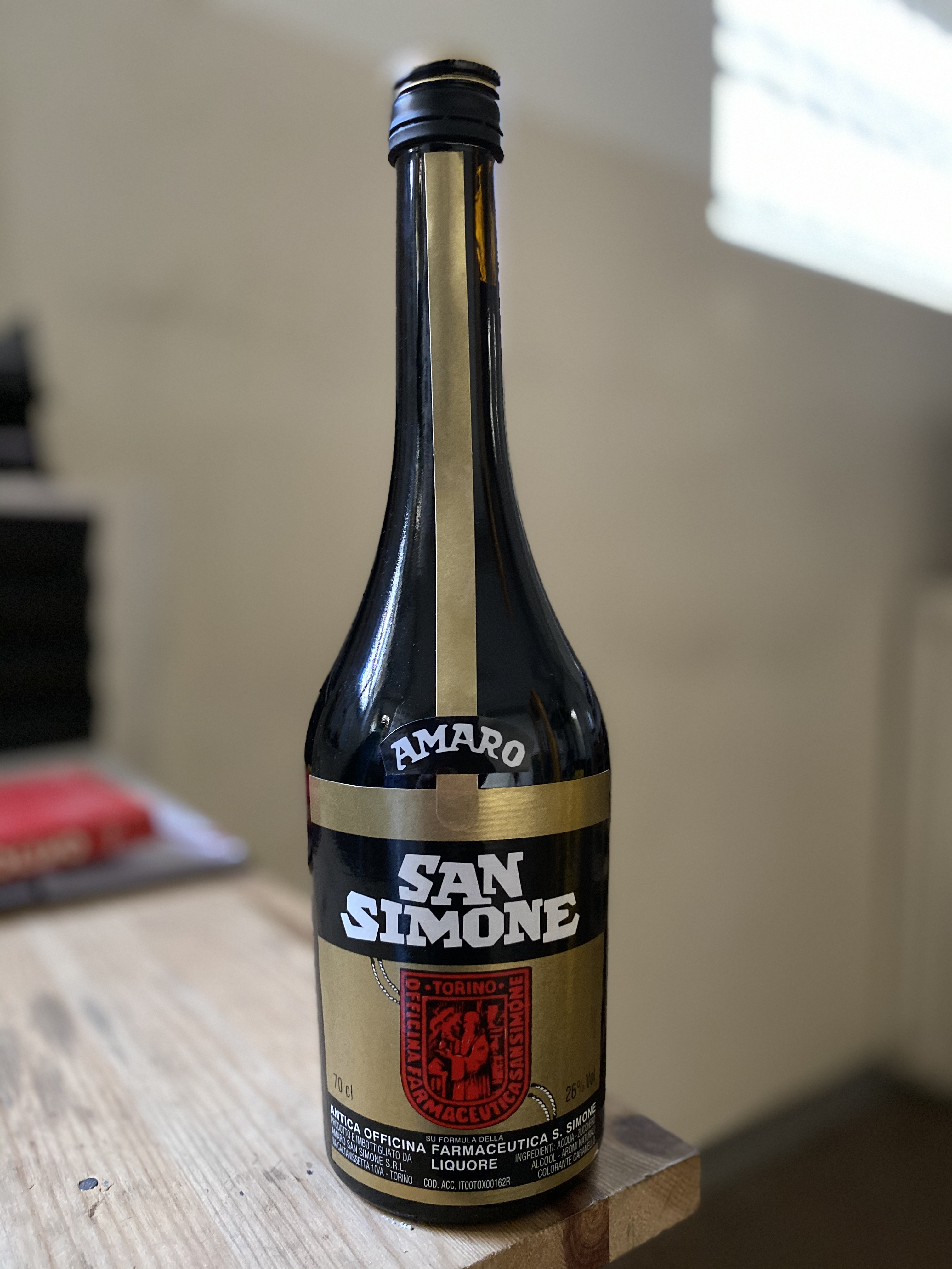 una classica bottiglia di Amaro San Simone.